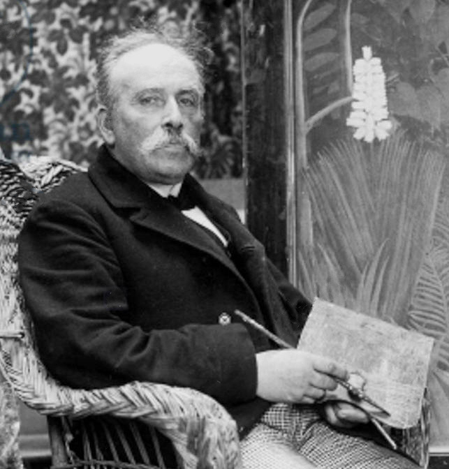 Rousseau dans son atelier de la rue Perrel devant le tableau Les Joyeux Farçeurs.